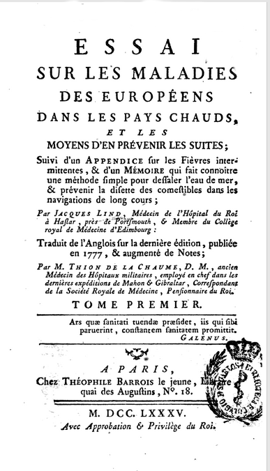 James Lind, Essai sur les maladies des européens dans les pays chauds et les moyens d'en prévenir les suites: suivi d'un appendice sur les fièvres intermittentes & d'un mémoire qui fait connoitre une méthode simple pour dessaler l'eau de mer, Volume 1. Traduction Claude-Esprit Thion de la Chaume, 1785.